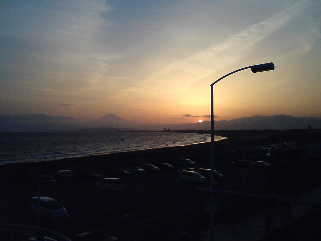 Sunset at Kugenuma beach.